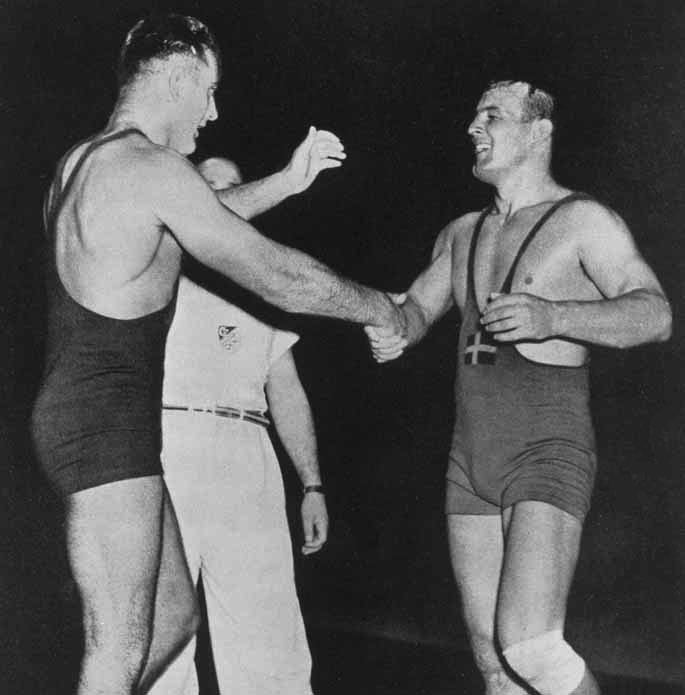 Fritz Stöckli vs. Bengt Fahlkvist, London Olympics